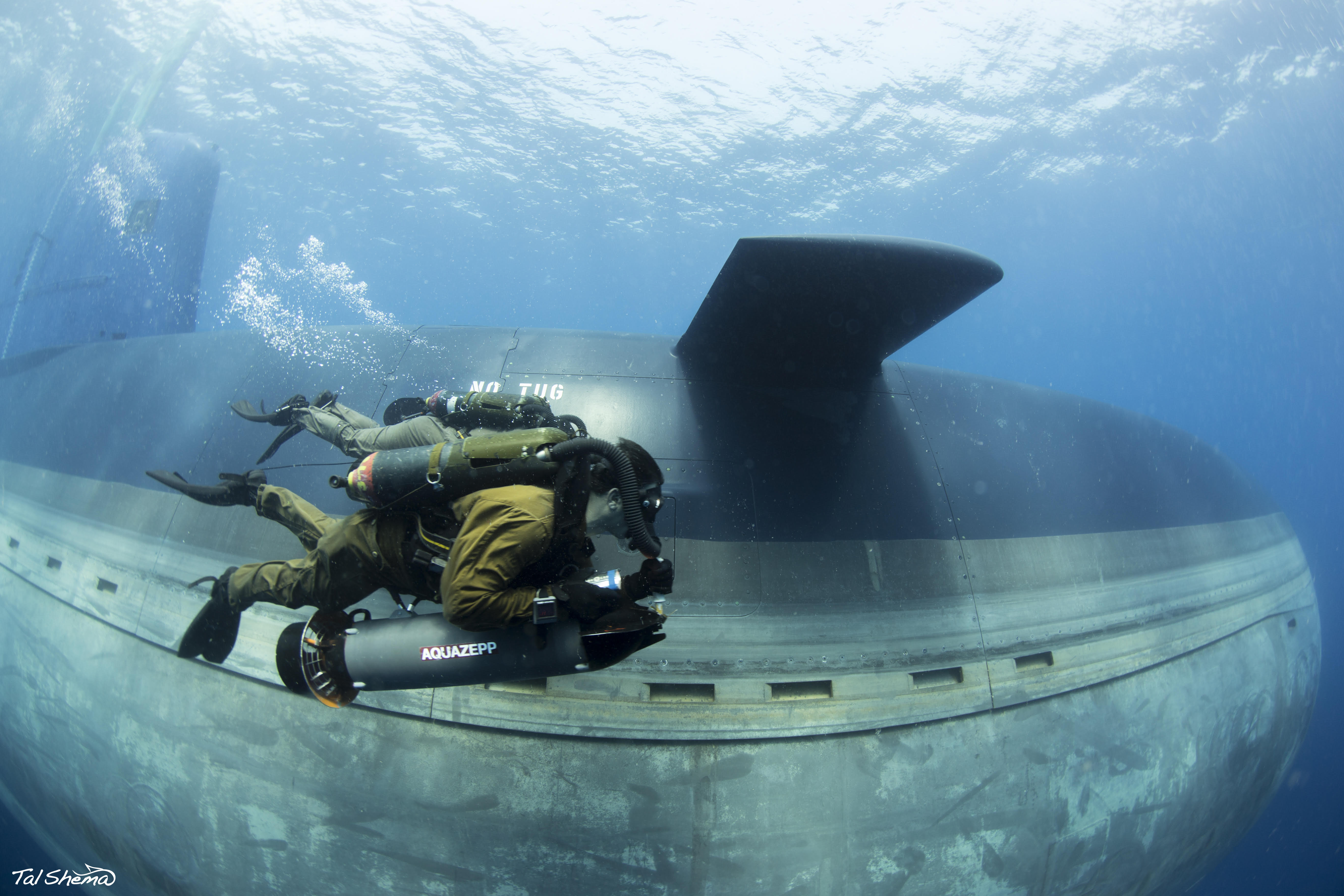 צוללי הילת"ם באימון עם שייטת 7